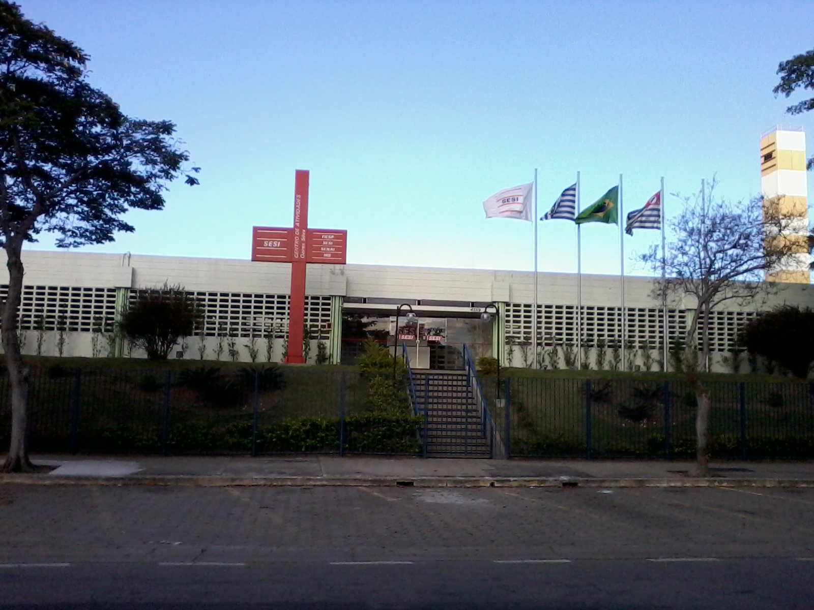 Vista parcial da unidade do SESI de São José dos Campos